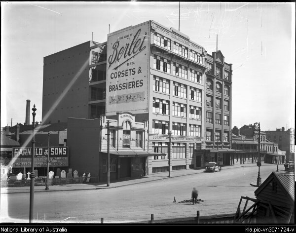 Berlei House, 39-47 Regent Street, Sydney, Australia